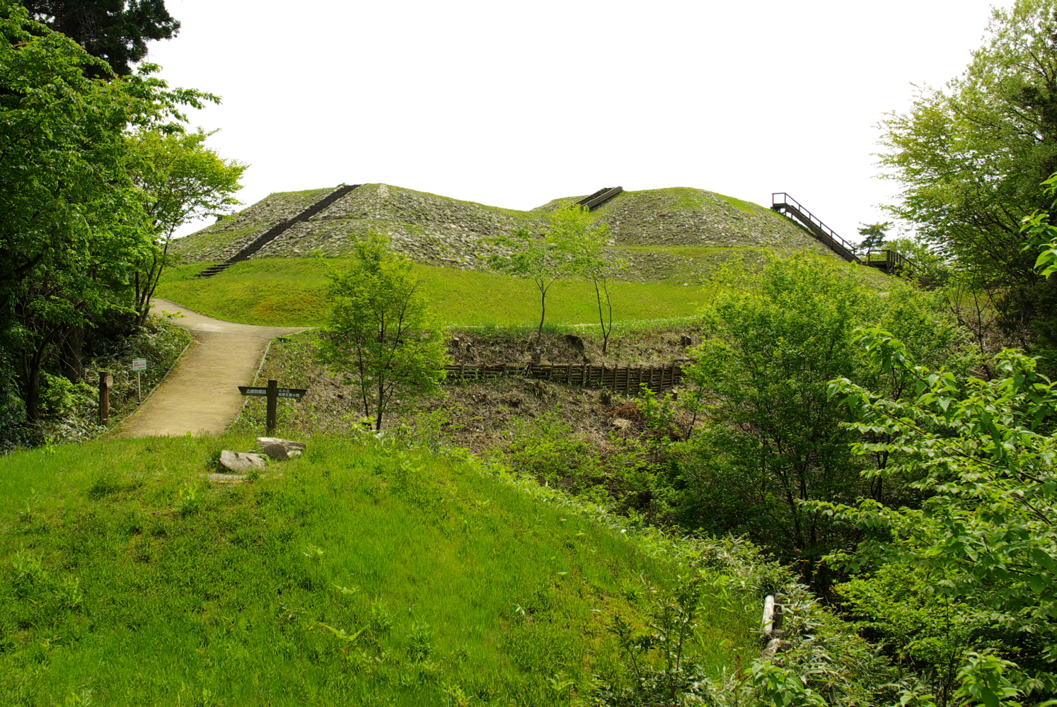 雨の宮1号墳と旧鹿西町が呼ぶ36号墳